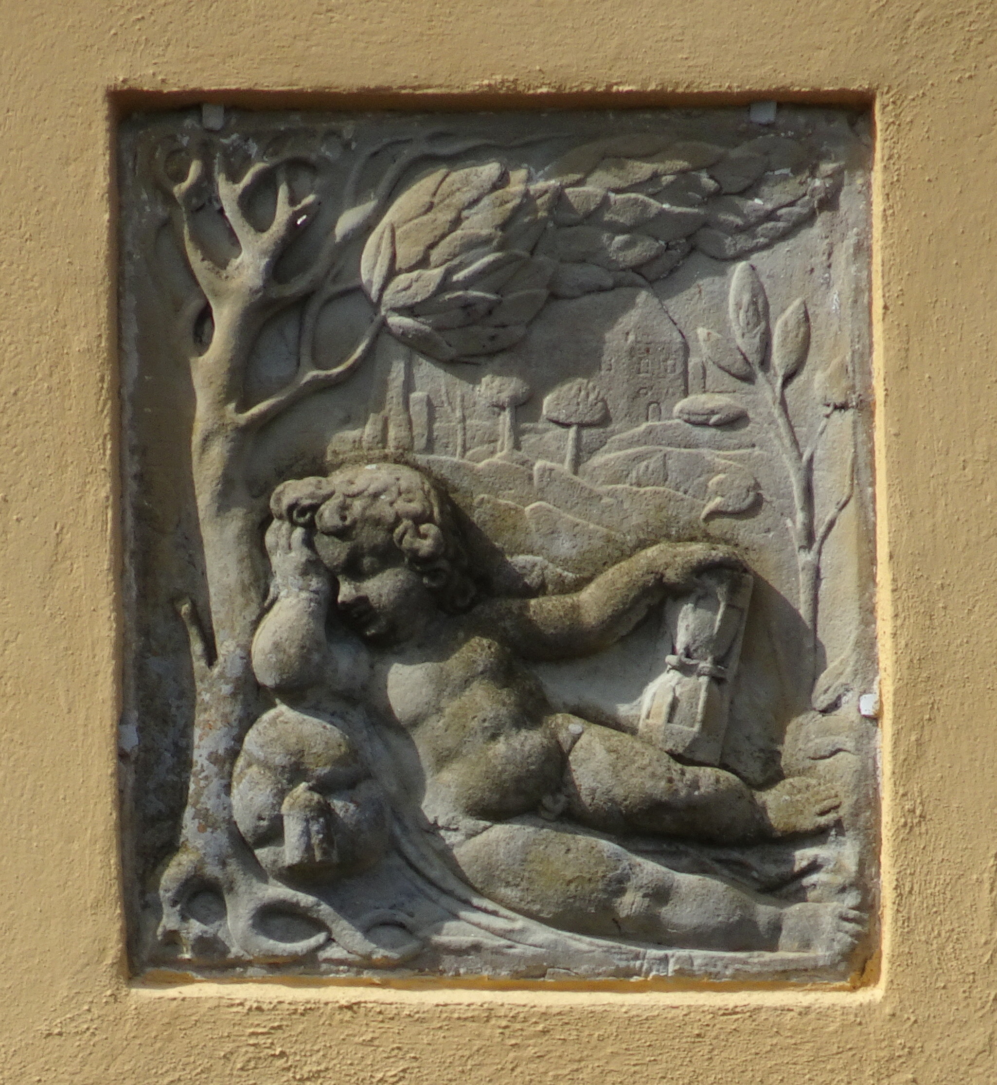 Säby gård, Aspö, fasad mot norr